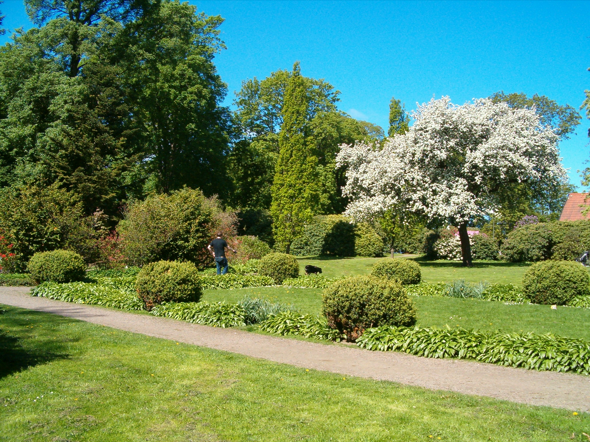 Garden at Vikingsberg Helsingborg, Sweden.